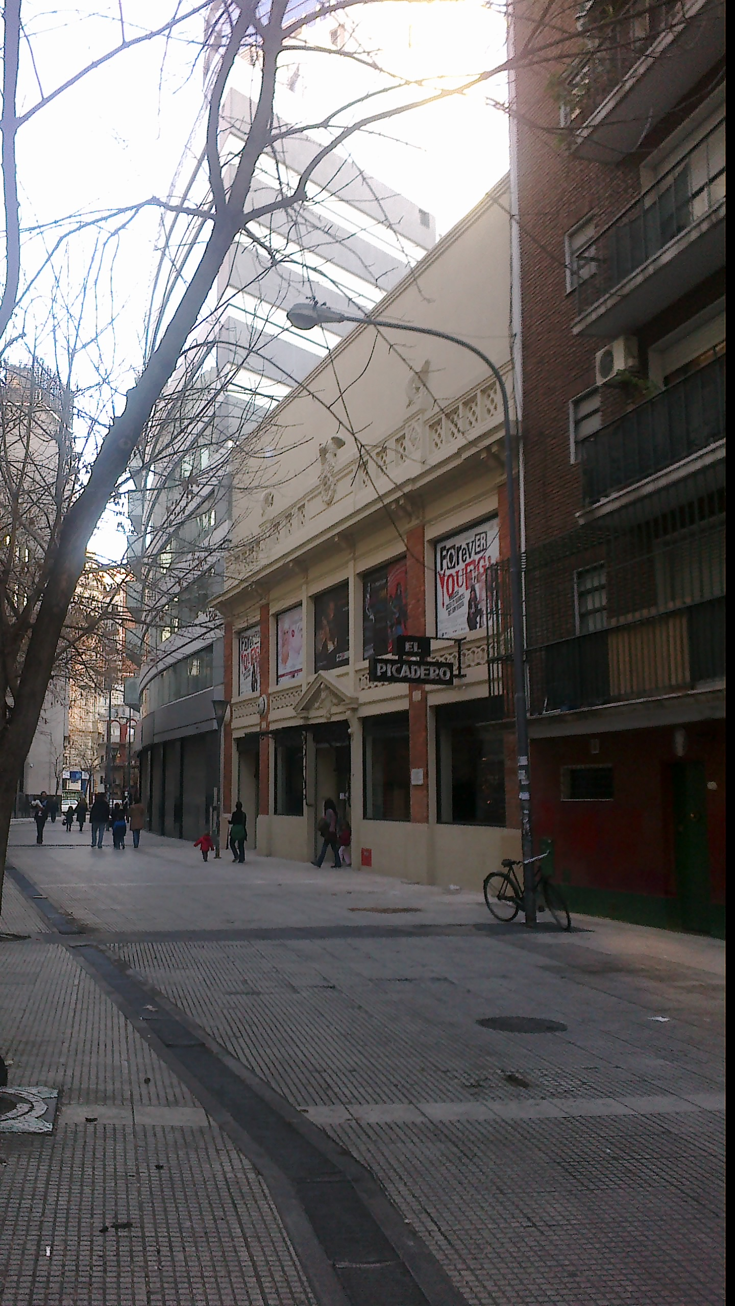 Teatro del Picadero, en pasaje Santos Discépolo, n° 1857, Barrio de Balvanera, Buenos Aires, Argentina.Construido en 1926 para la fábrica de bujías Bosch, fue inaugurado como teatro en 1980, destruido por una bomba el 6 de agosto de 1981, y reinaugurado el 23 de mayo del 2012.